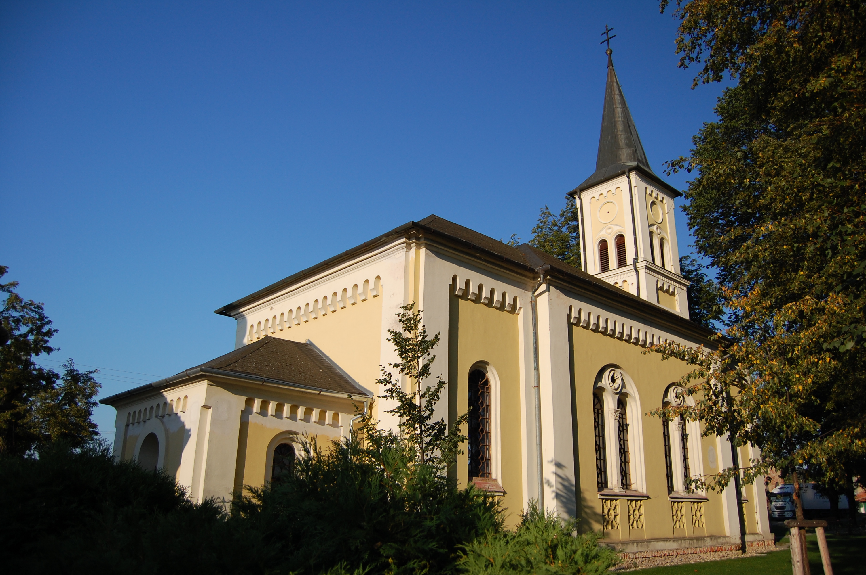 Kostel Nejsvětější Trojice - zadní pohled, Lešany, okres Prostějov